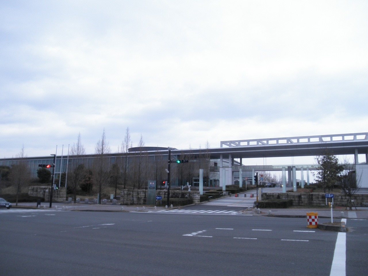 私のしごと館跡地